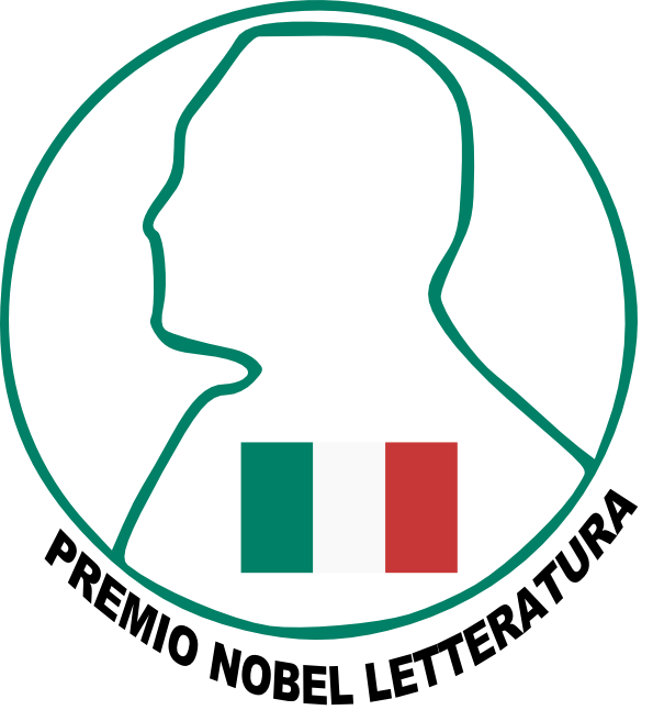 ICONO PARA NOBELS ITLIANOS